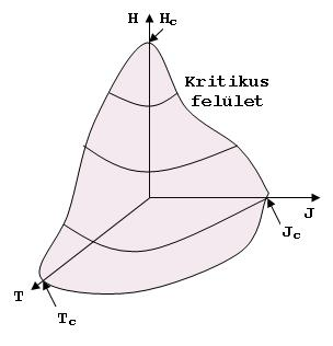 A szupravezető állapotát meghatározó kritikus felület. Három érték határozza meg: A szupravezető hőmérséklete (T) A mágneses térerősség (H) Az áramsűrűség szupravezető belsejében (J) A felület alatt szupravezető állapotban van, afölött normál állapotban. Alakja változó, az anyagtól függ